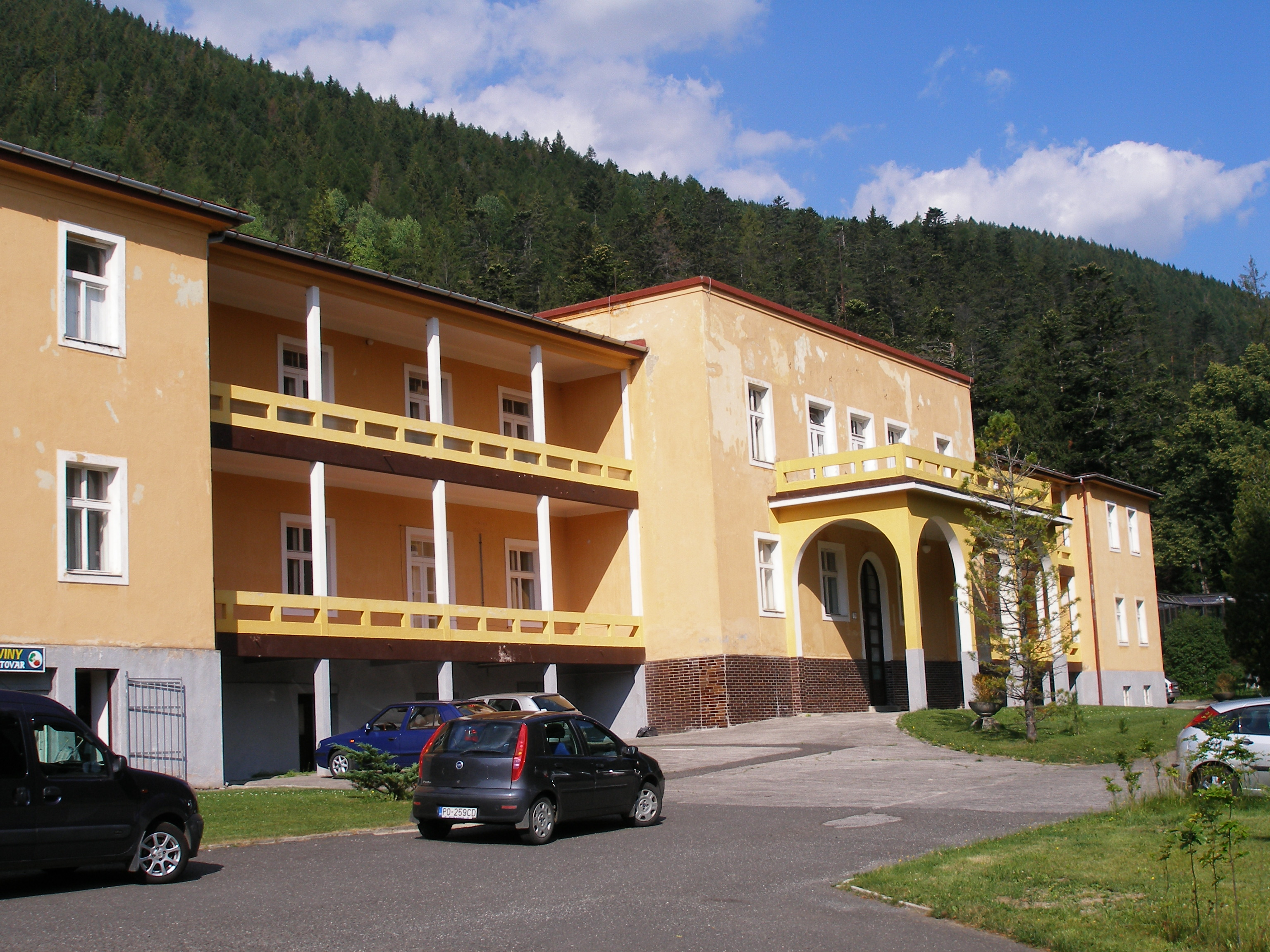 Osada Tatranská Kotlina, Slovakia